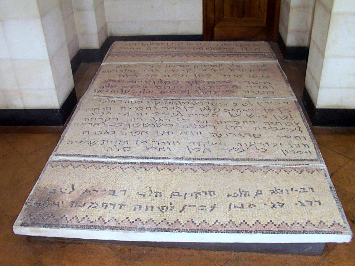 כתובת בית הכנסת בעין גדי בhe:מוזיאון רוקפלר